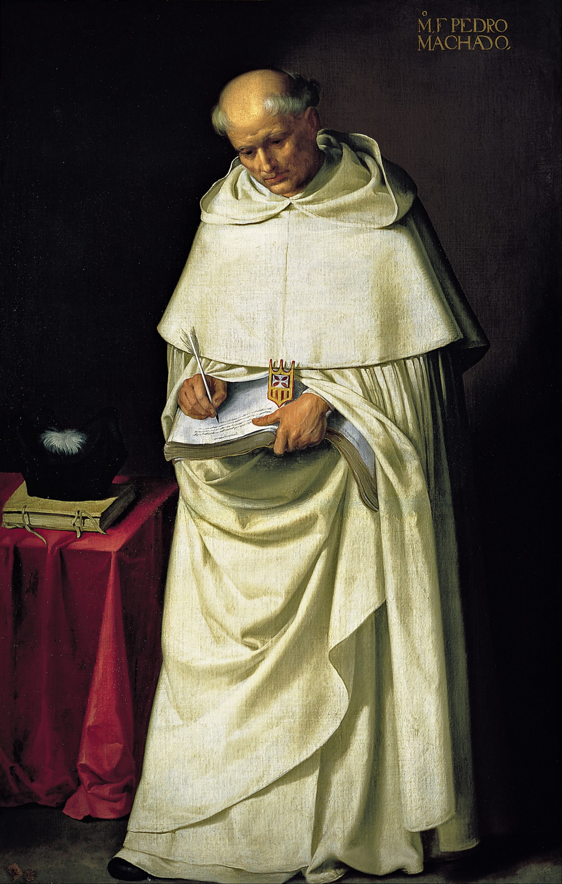 La obra representa a Fray Pedro Machado, que nació en Zafra y fue profesor de Teología en la Universidad de Salamanca.